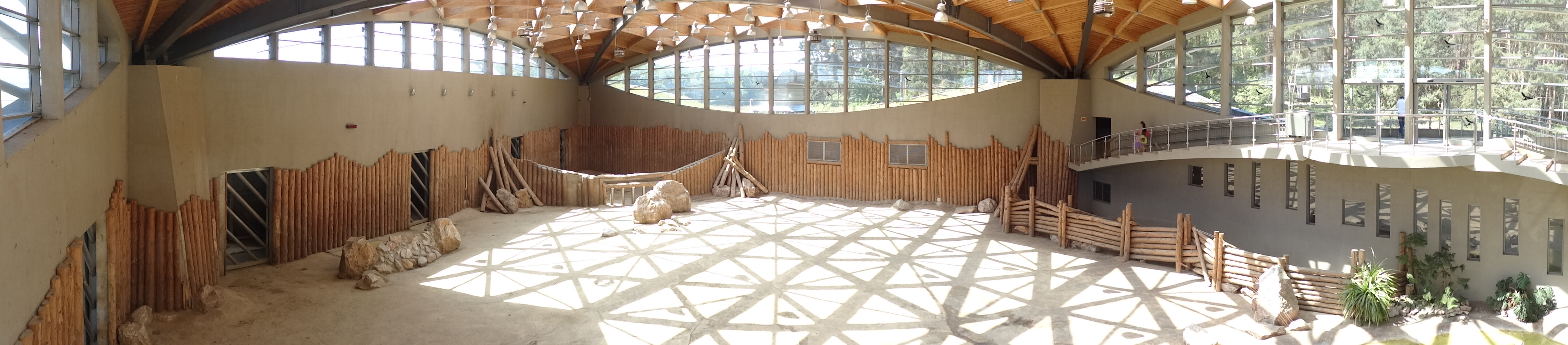 Słoniarnia w Poznaniu, wnętrze